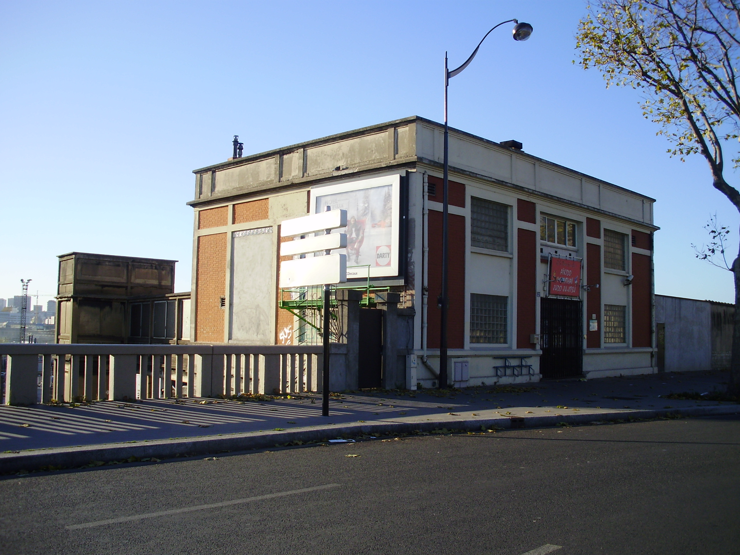 Ancien bâtiment voyageurs de la gare de Bercy-Ceinture, au 320 bis de la rue de Charenton, Paris 12e, France, devenu un club d’arts martiaux.